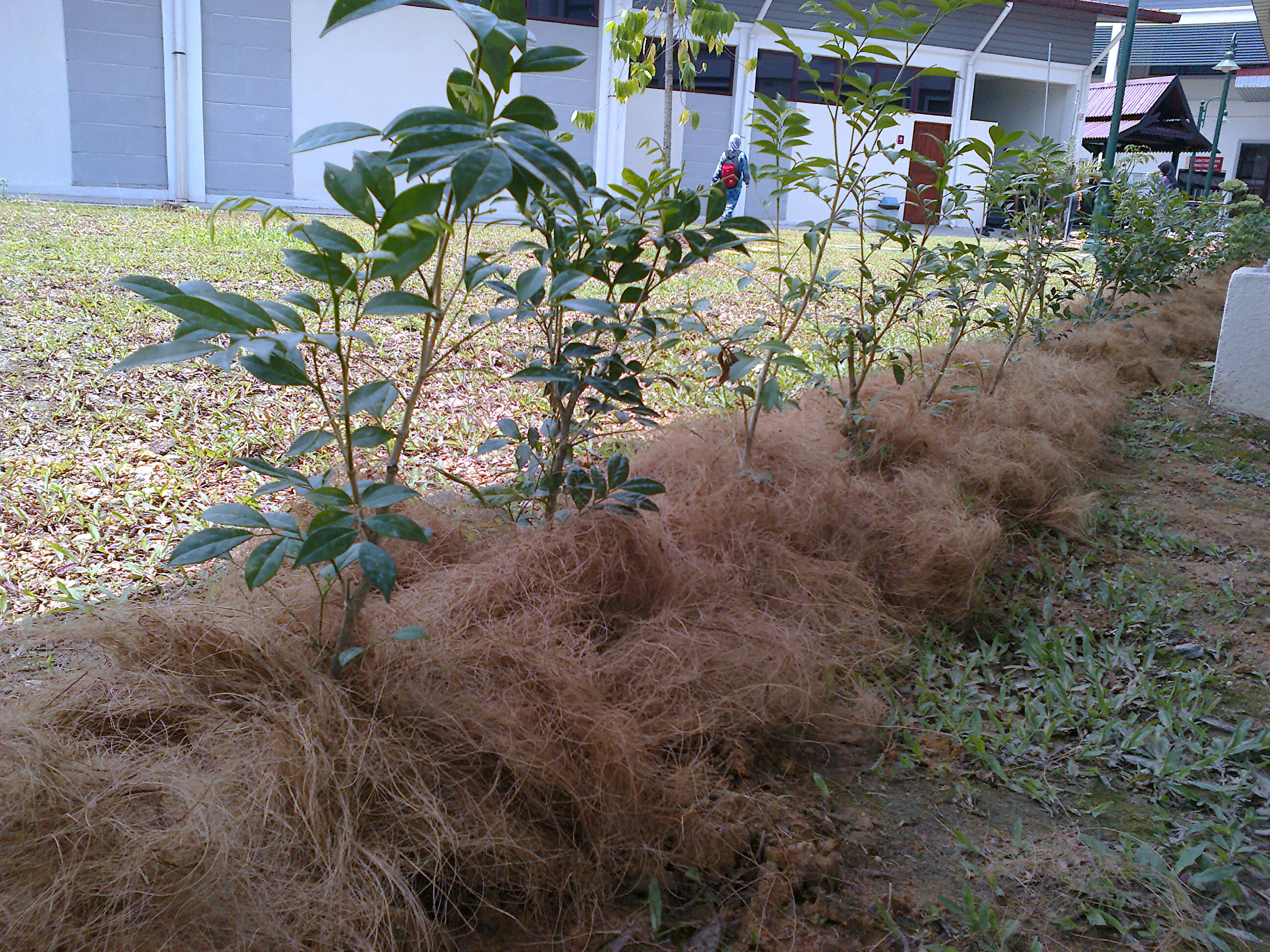 Sungkup daripada sabut kelapa.